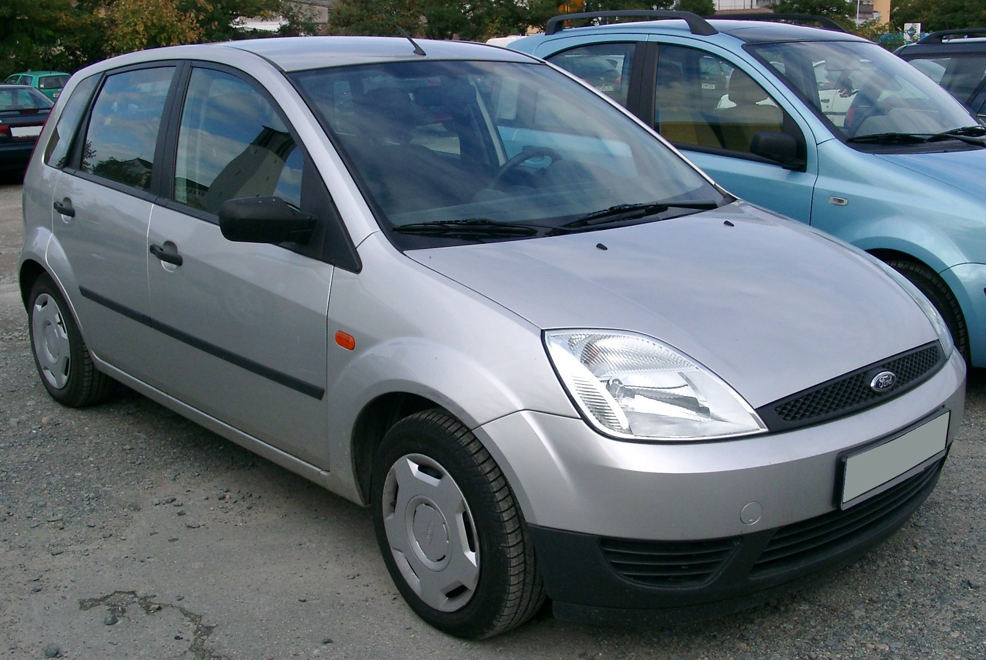 Ford Fiesta MK5